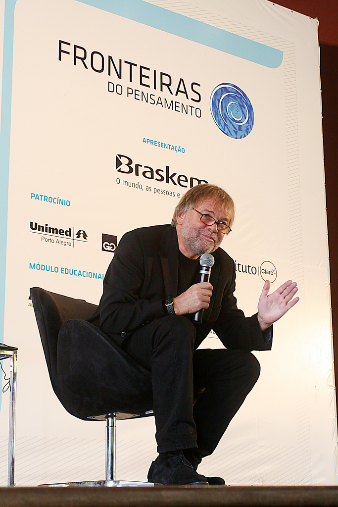 Jostein Gaarder no Fronteiras Educação – Diálogos com Professores 2010